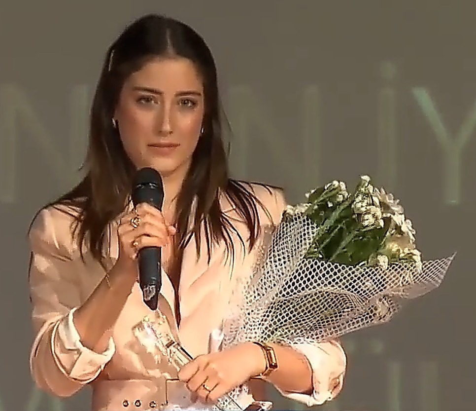 İstanbul Aydın Üniversitesi İletişim Ödülleri’nde Bizim Hikaye dizisiyle ‘En İyi Kadın Oyuncu’ ödülüne layık görülen Hazal Kaya, konuşmasını “Her şey çok güzel olacak” sözleriyle tamamladı.